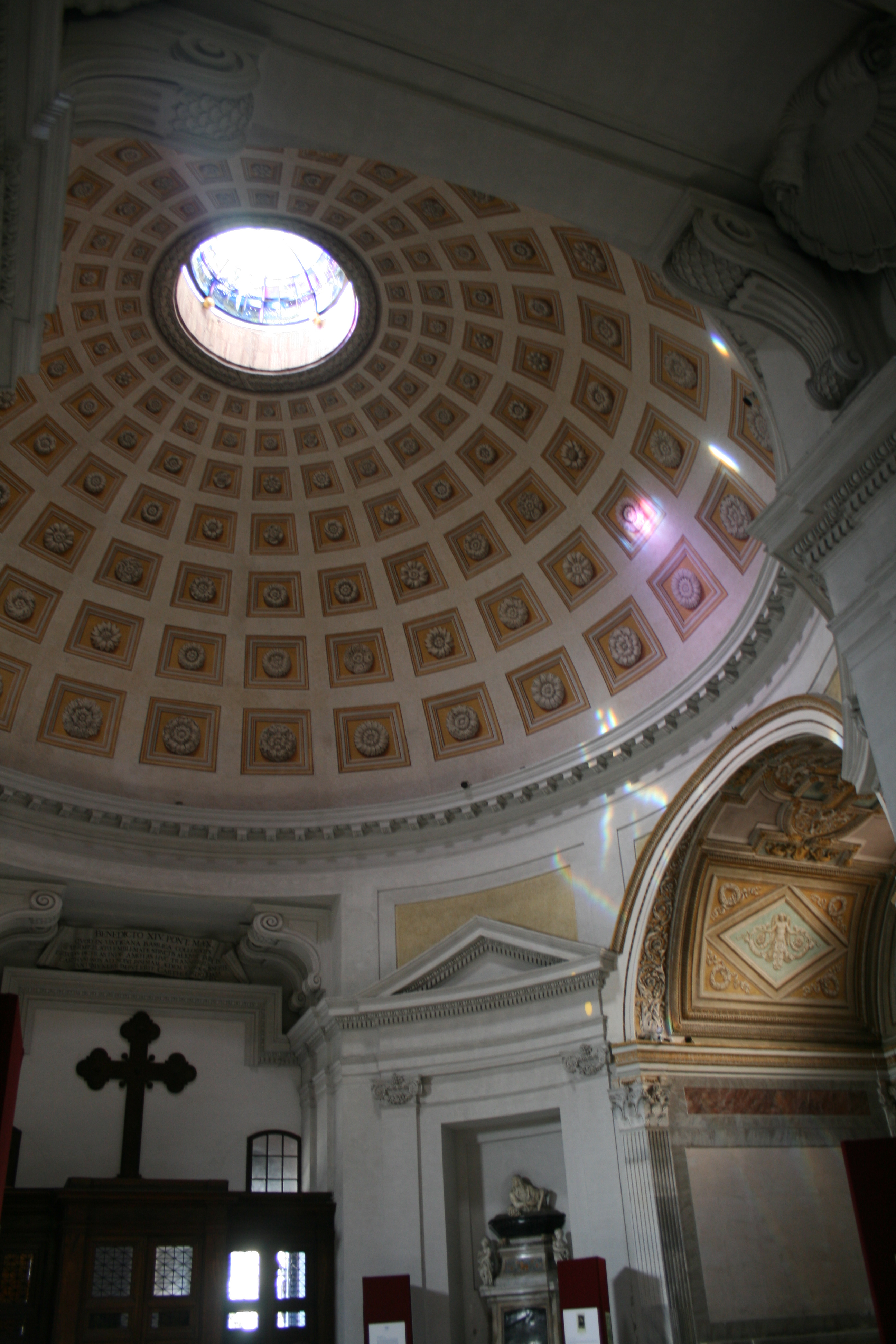 Gewölbe von Maria degli Angeli in Rom - ehemaliges Frigidarium der Diokletiansthermen